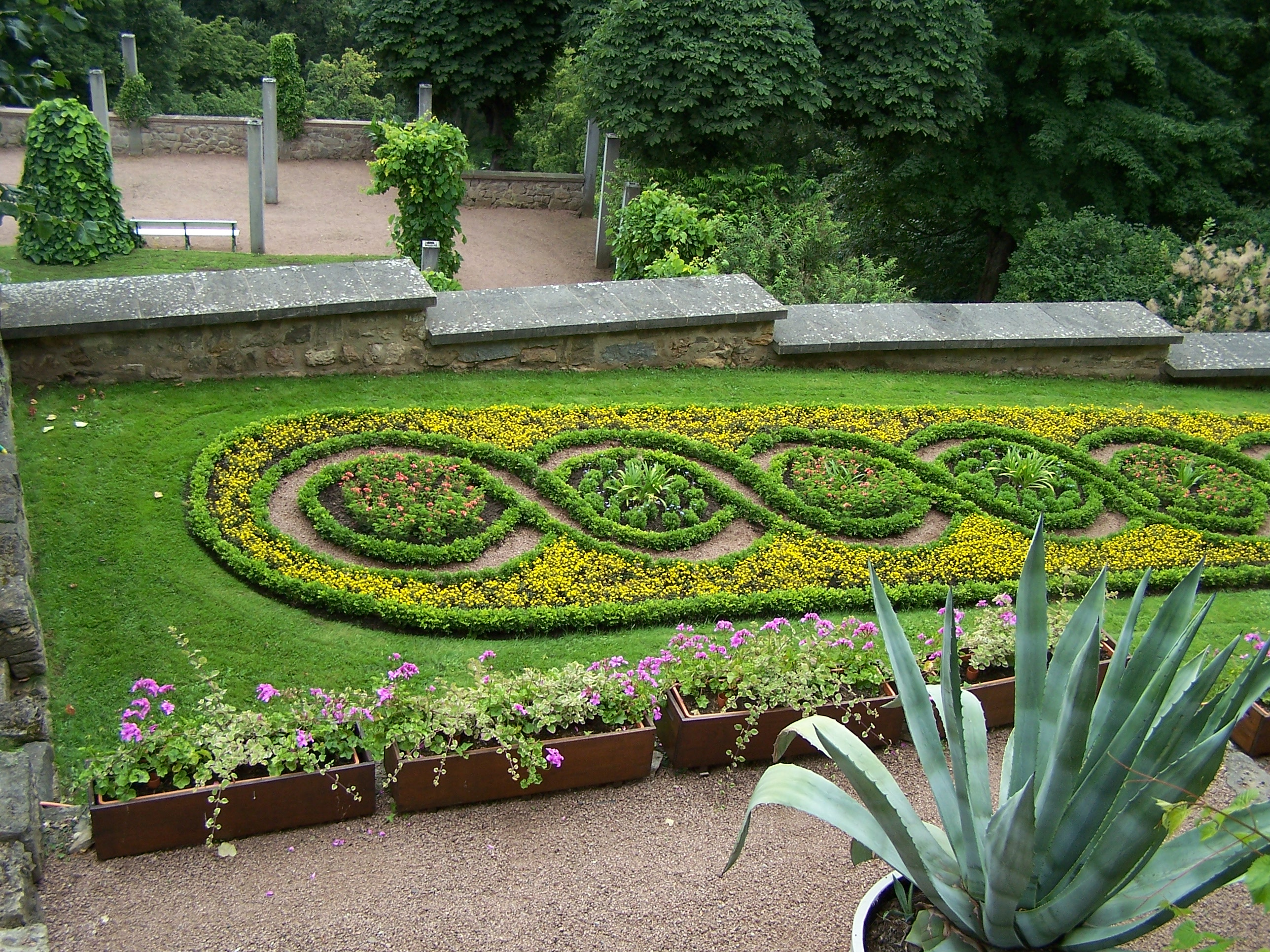 Ein Zopfbeet auf der mittleren Terrasse am Schloss Altenstein.